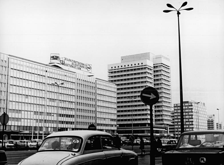 Berlin, Alexanderplatz, Hochhaus, Touristikzentrum, Warenhaus ADN-ZB Franke 4-4-72 Berlin: Täglich besuchen viele in- und ausländische Touristen den großzügig gestalteten Alexanderplatz. Unser Foto zeigt einen Blick auf die Nordseite mit dem Elektroindustriewarengeschäft und auf das Gebäude, in dem das Reisebüro seinen Sitz hat. // Richtig wäre: ...zeigt das Gebäude "Haus der Elektroindustrie", daneben das "Haus des Reisens"